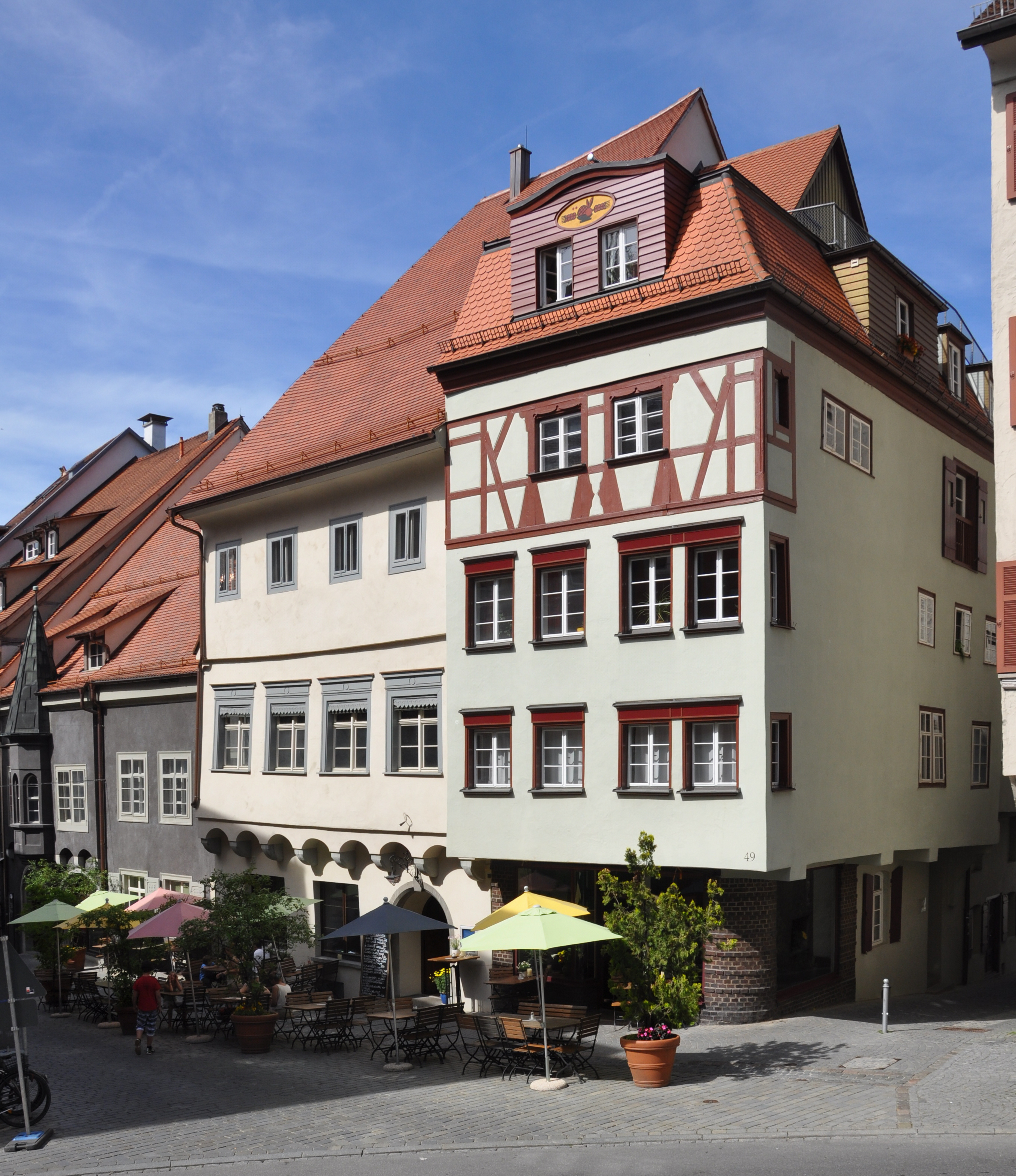 Ravensburg, Humpisquartier, Häuser Marktstraße 47 und 49